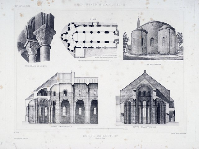 Plans, chapiteaux